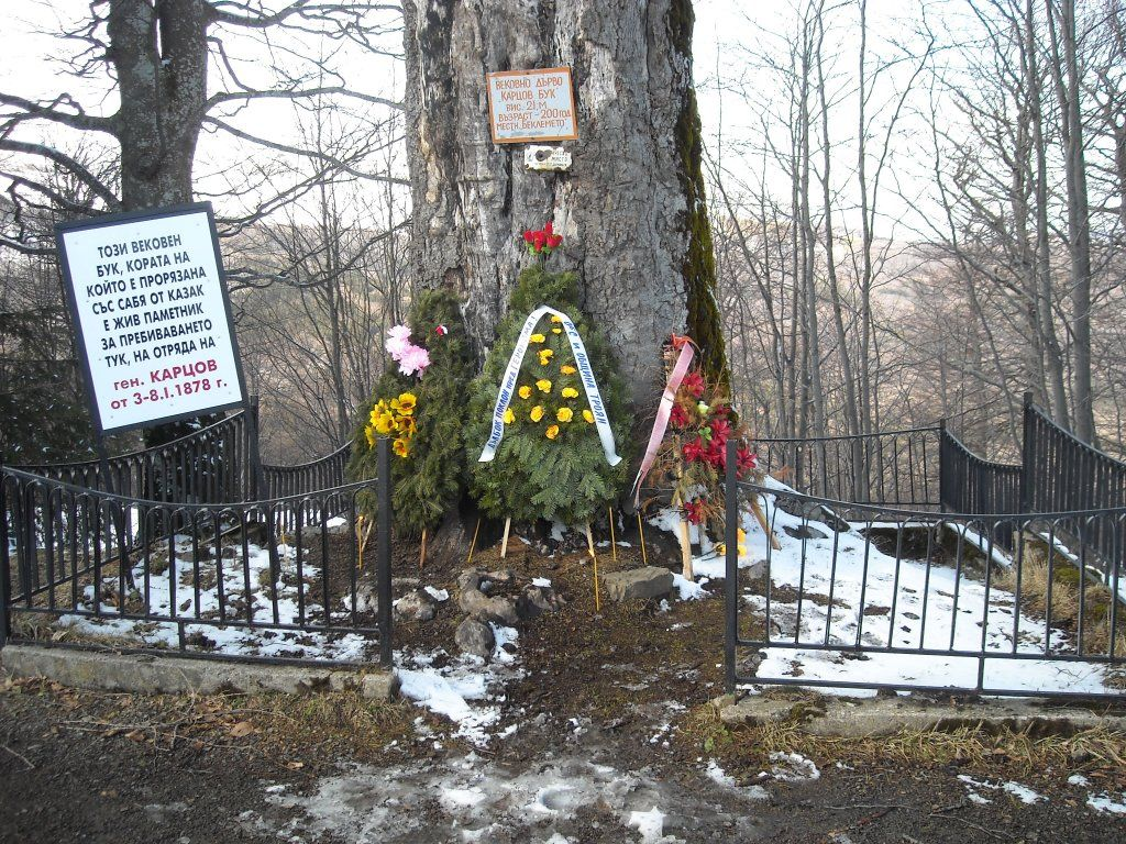 Карцовият бук е 21 метра високо дърво на 200 години, намиращо се в местността Беклемето до град Троян. Именувано е на генерал Карцов, който през Руско-турската война прекосява Балкана през Троянския проход. Легендата разказва, че той оставя следа от своята сабя на дървото.